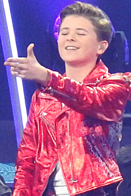 Niderlandzki piosenkarz Matheu Hinzen podczas prób do występu w finale Konkursu Piosenki Eurowizji dla Dzieci 2019.